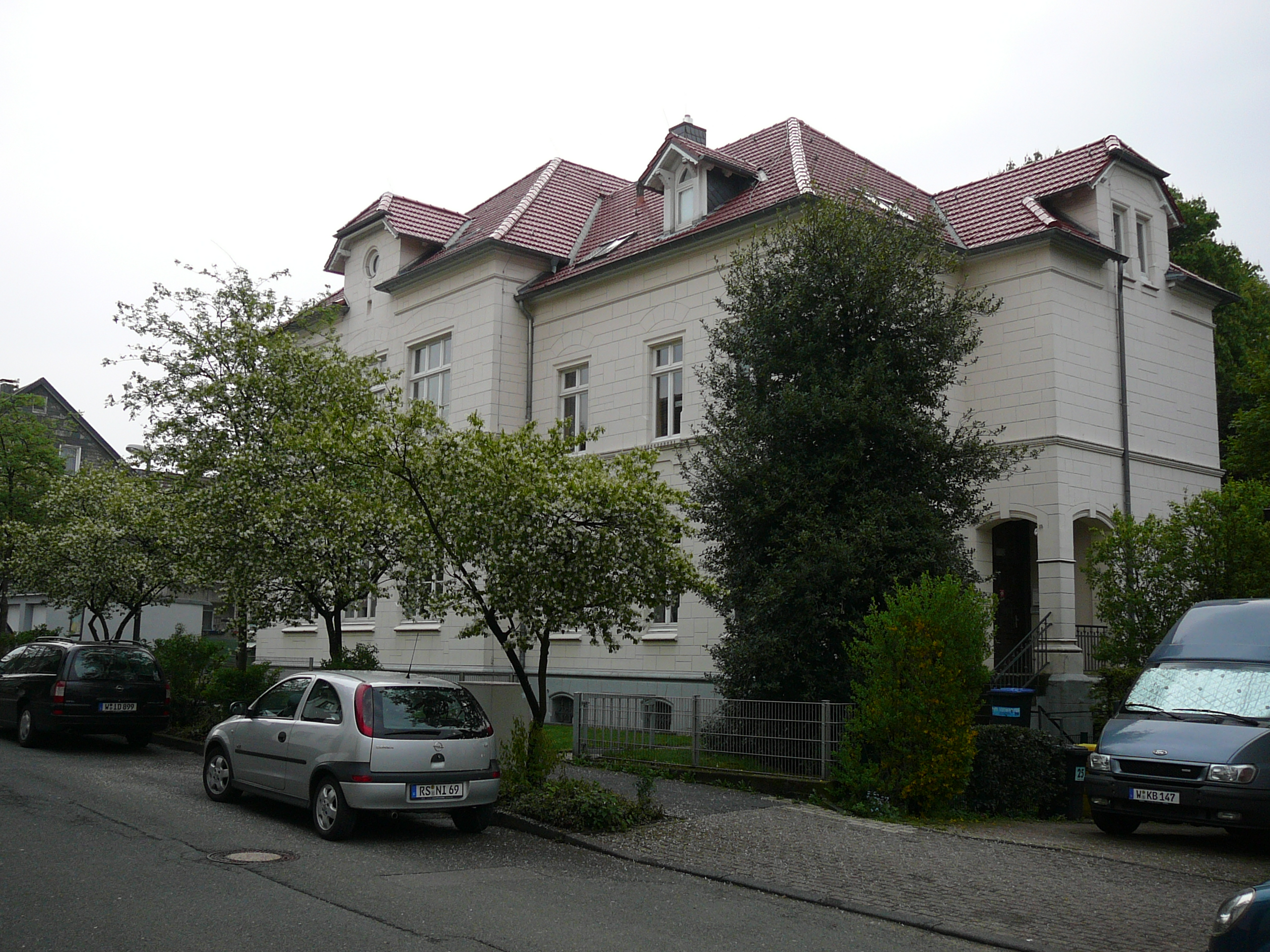 Scheidtstraße, Wuppertal